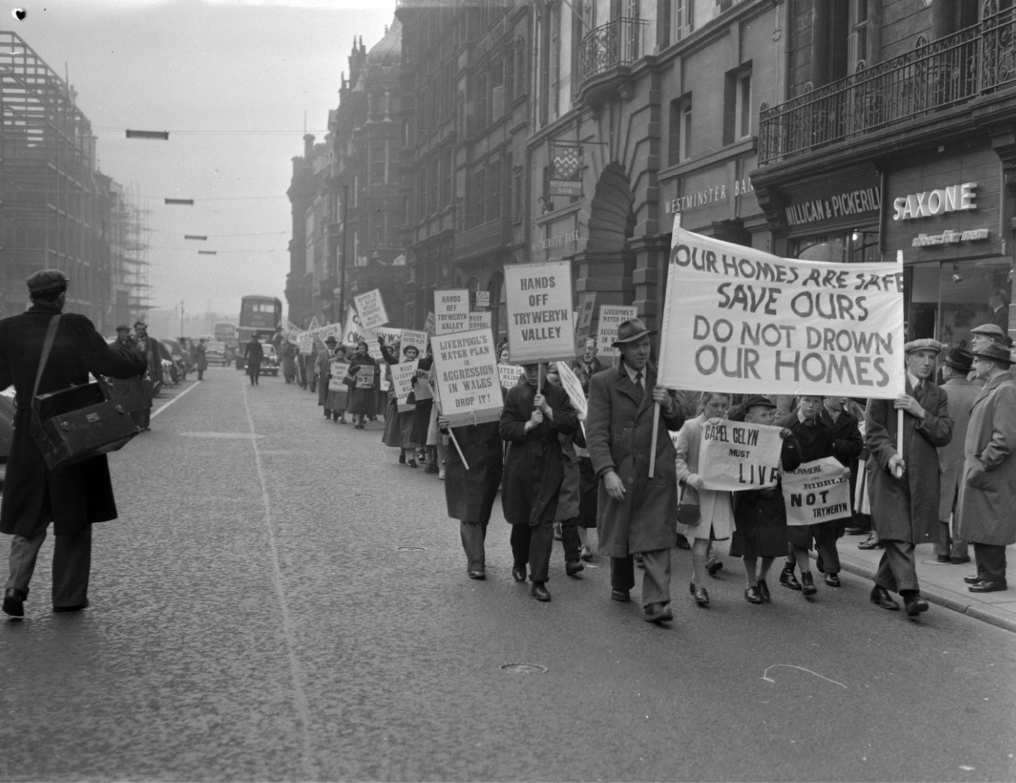 Teitl Cymraeg/Welsh title: Protest yn Lerpwl yn erbyn boddi Cwm Tryweryn Ffotograffydd/Photographer: Geoff Charles (1909-2002) Dyddiad/Date: 21/11/1956 Cyfrwng/Medium: Negydd ffilm / Film negative Cyfeiriad/Reference: (gch13939) Rhif cofnod / Record no.: 3370636 Rhagor o wybodaeth am gasgliad Geoff Charles yn Llyfrgell Genedlaethol Cymru More information about the Geoff Charles Collection at the National Library of Wales Mae ffotograffau Geoff Charles hefyd yn rhan o Broject Europeana Libraries Geoff Charles' photographs also form part of the Europeana Libraries Project